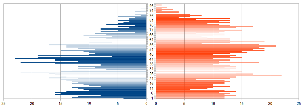 Kose rahvastikupüramiid 2014. aastal. Põhineb Rahvastikuregistri andmetel.